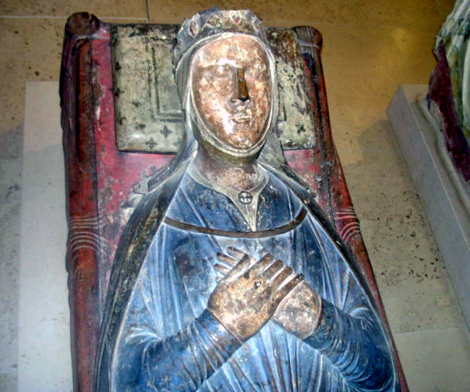 Isabelle d'Angoulême, tombe dans l'église de l'abbaye de Fontevraud (France)